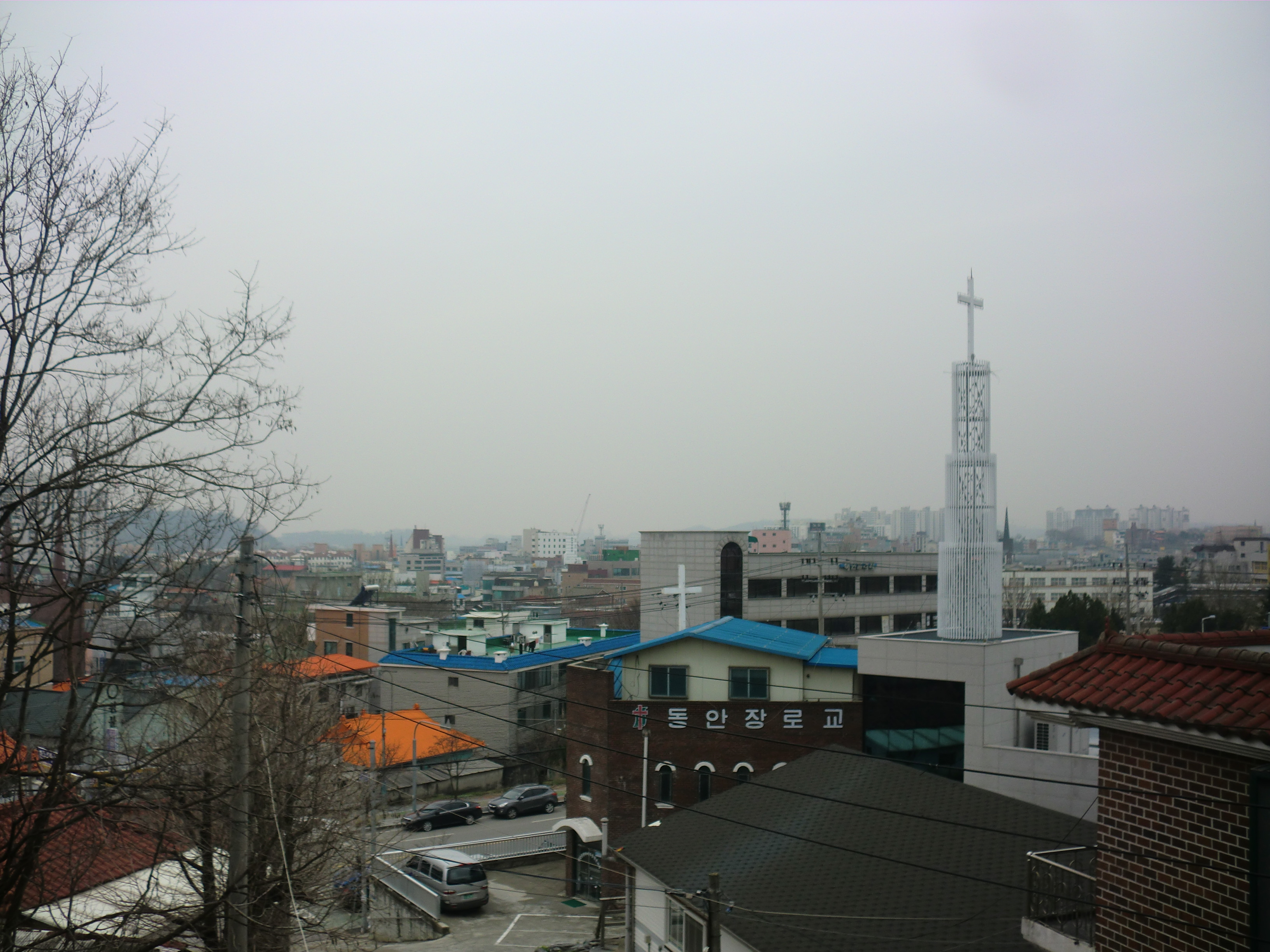 안성시청에서 본 안성시중심부